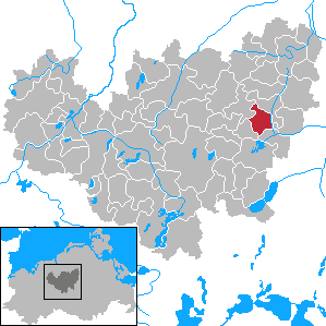 Sukow-Levitzow in Mecklenburg-Vorpommern - District Güstrow